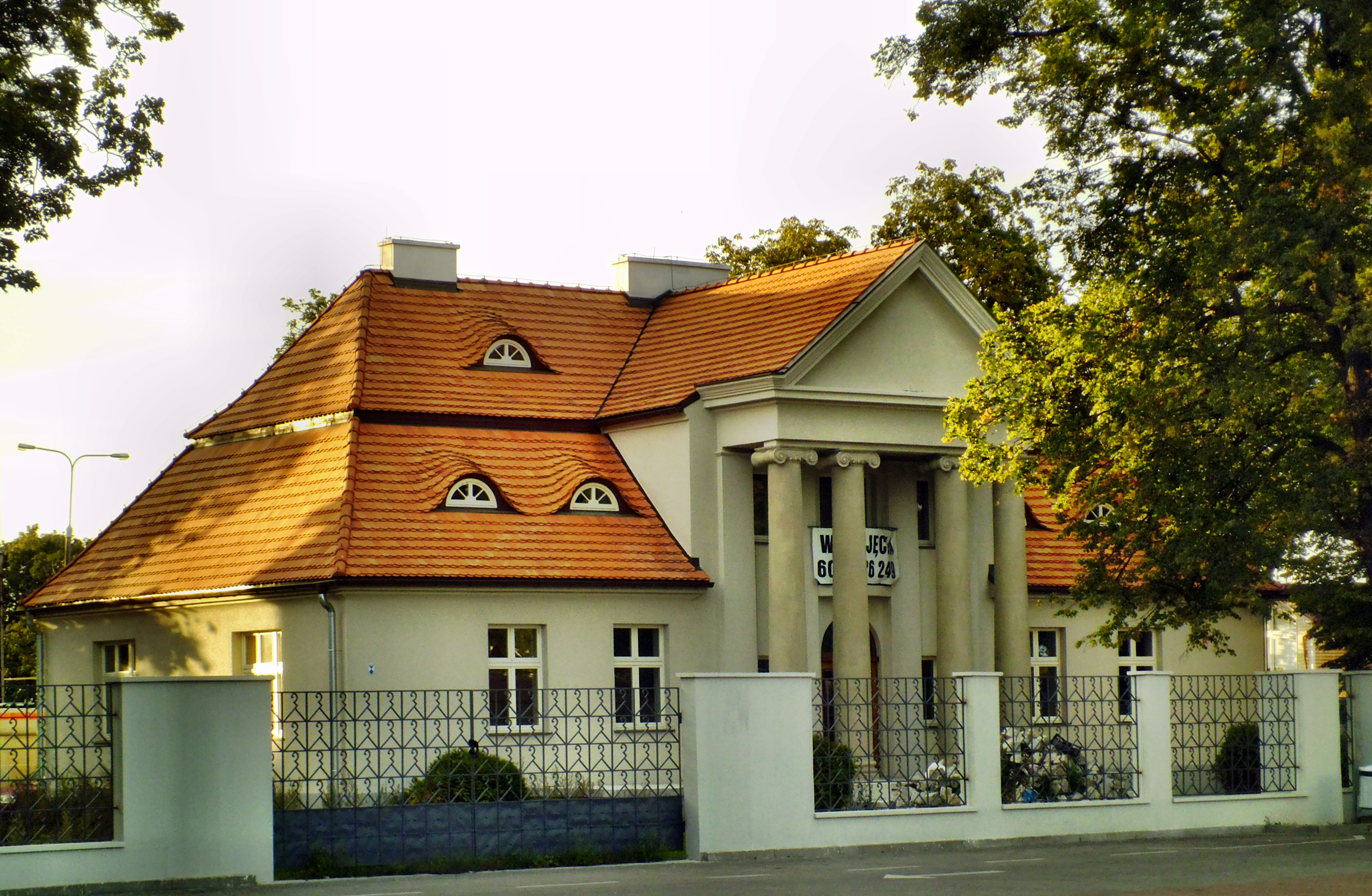 Gdynia Chylonia, ul. Chylońska 112a - dwór w zespole dworskim